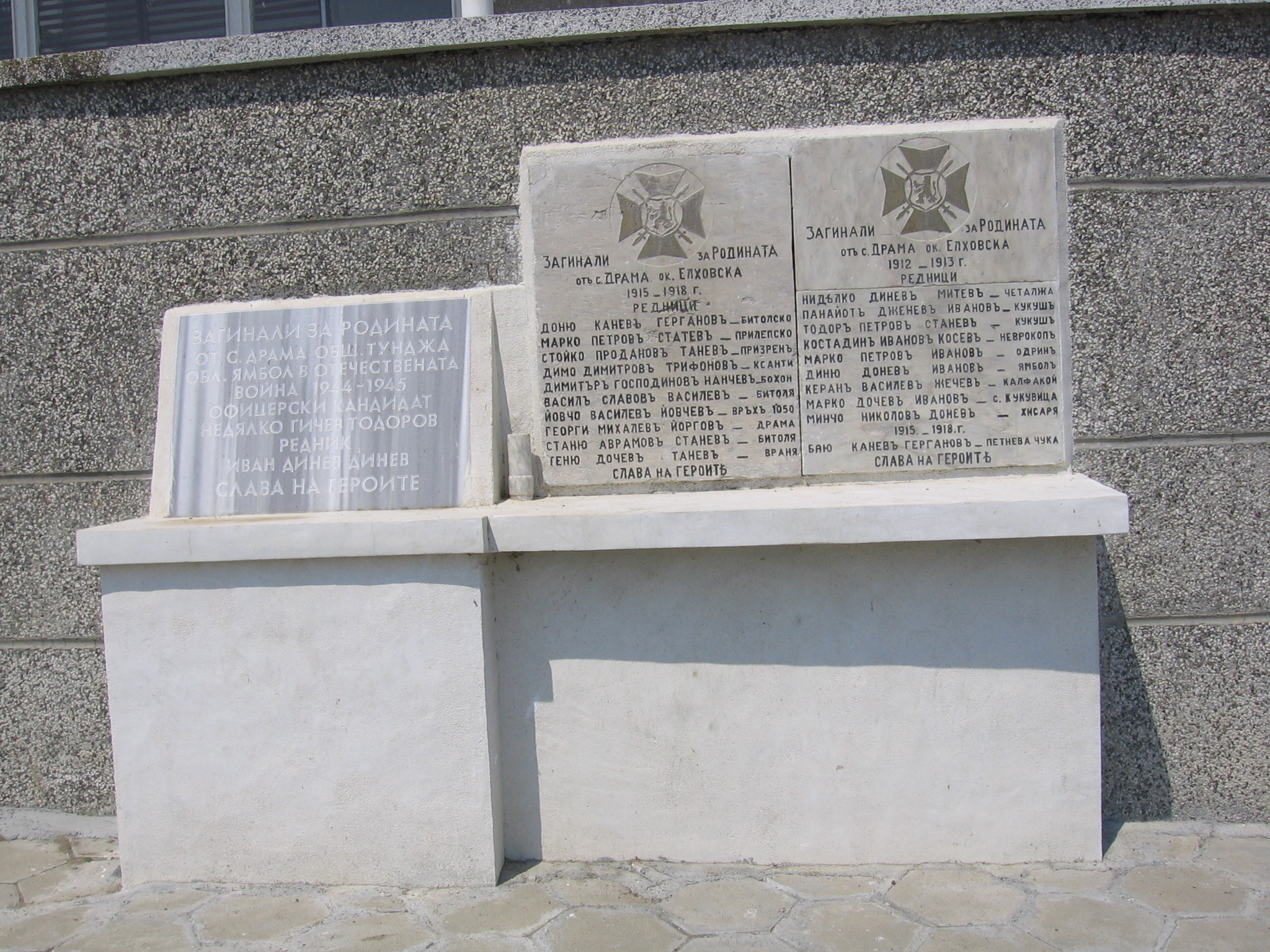 Паметник на падналите за родината в село Драма, България